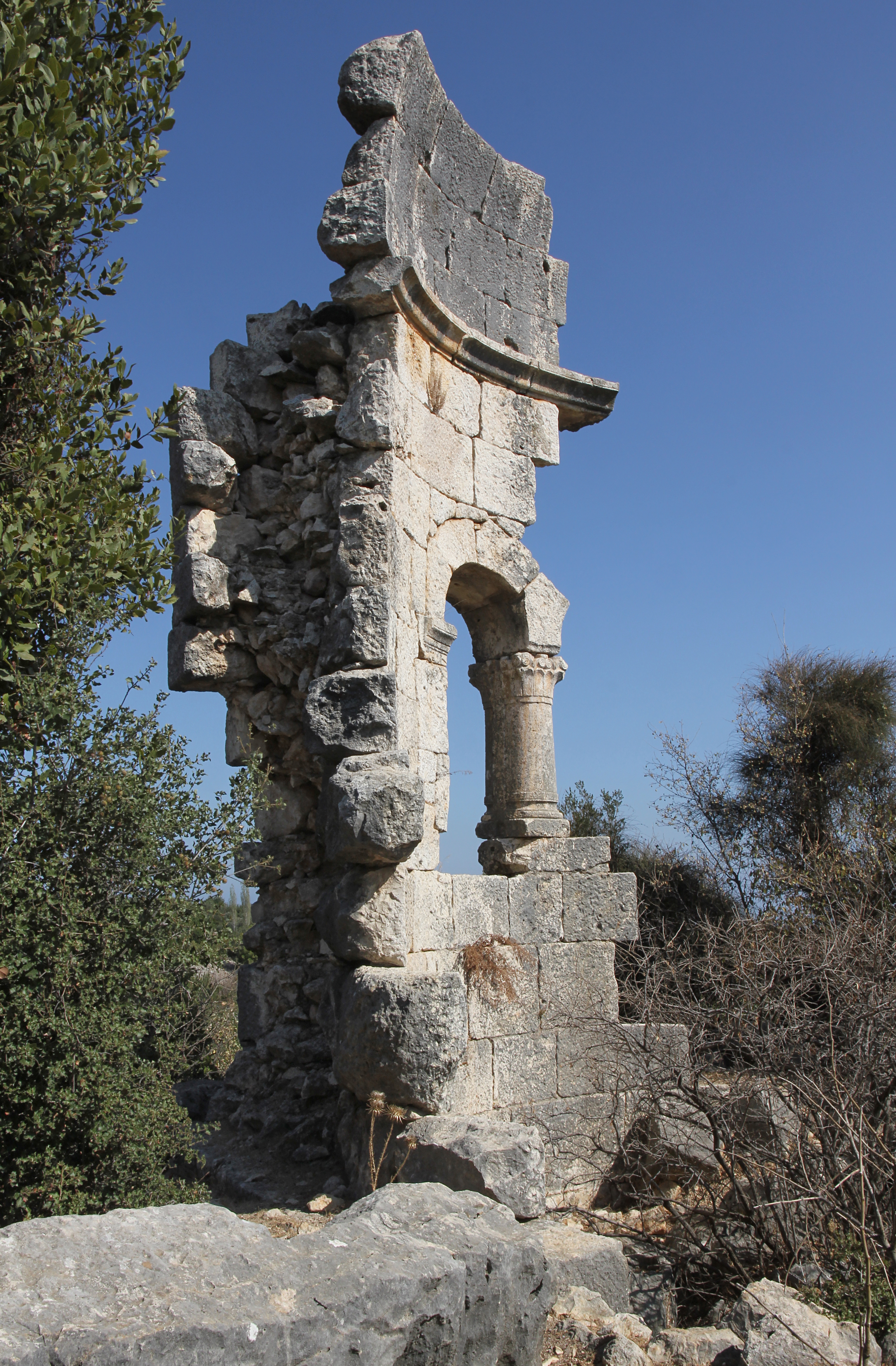 Hacıömerli, römisch-frühbyzantinische Siedlung in der Nähe von Erdemli, Südtürkei, Apsis der Basilika von Norden